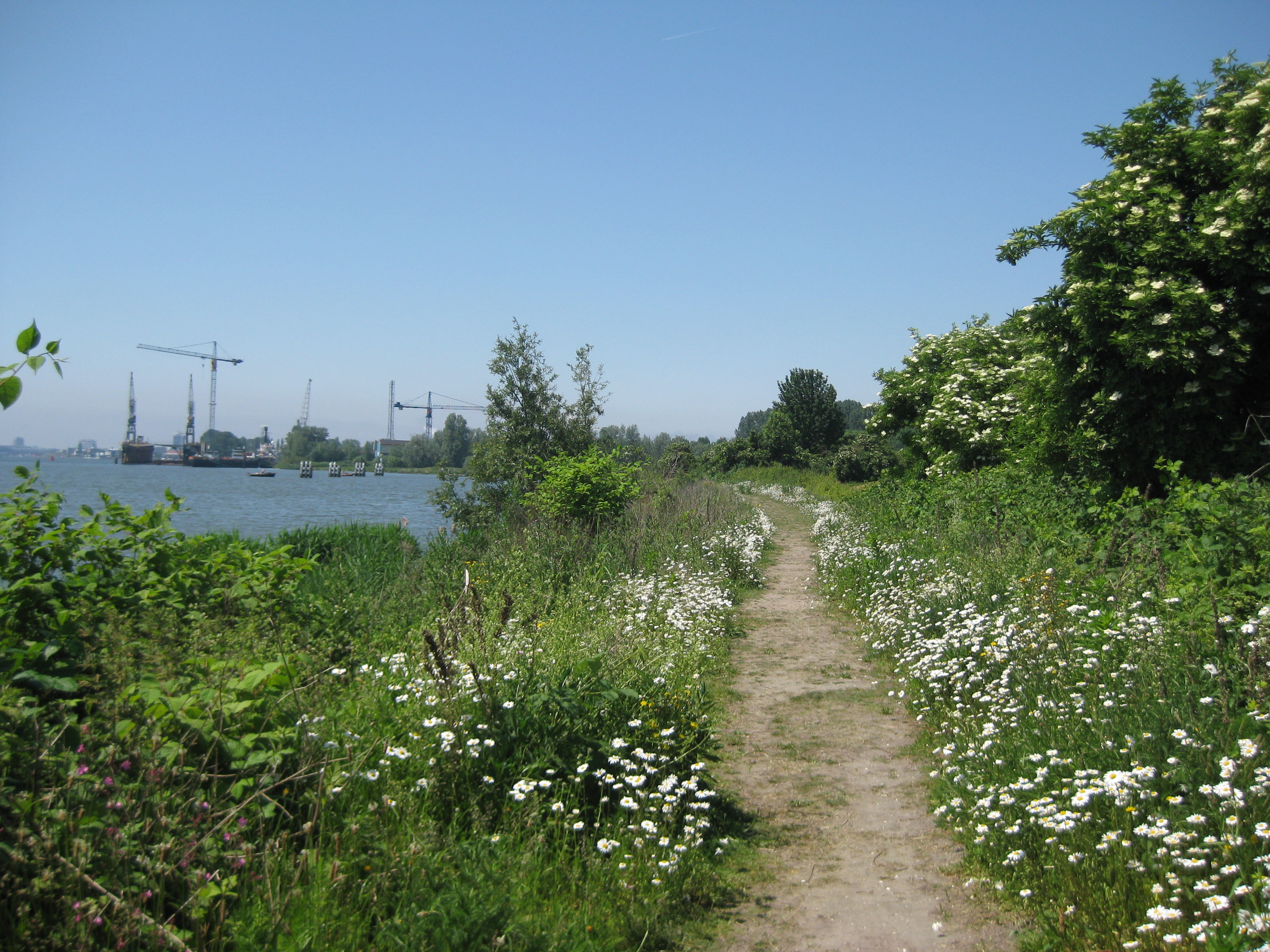 Schellingwouderpark aan Het IJ in Amsterdam-Noord met op de achtergrond de Oranjewerf